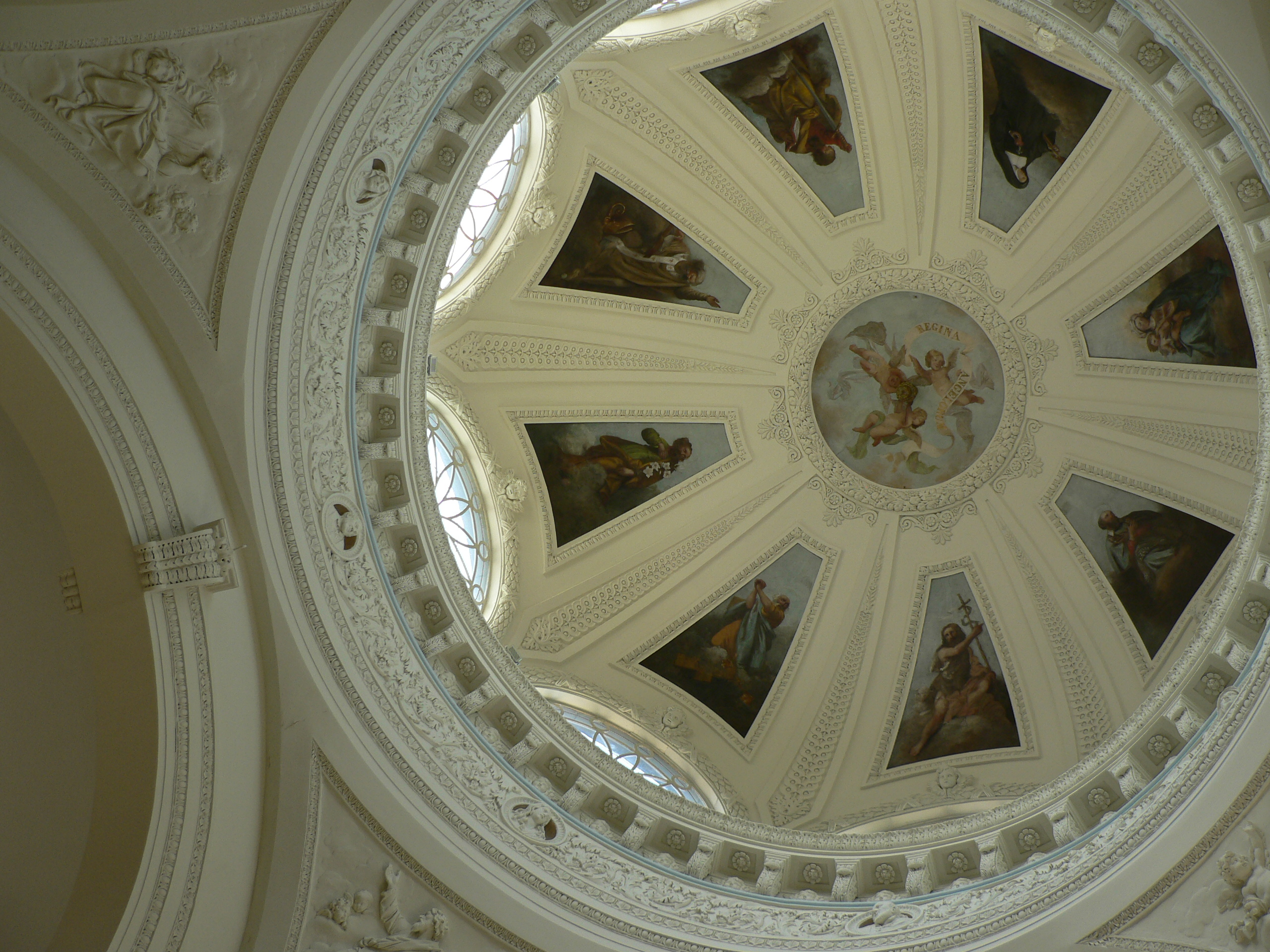 Vue de la coupole de l'église de l'ancien couvent de la Visitation à Amiens, 61 rue Saint-Fuscien.